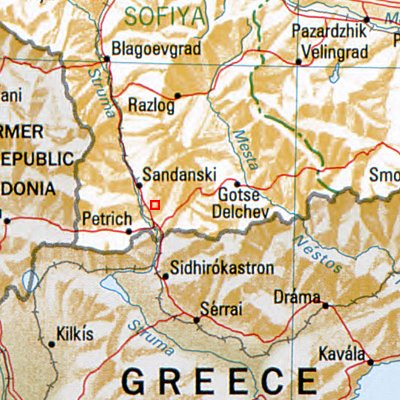 Melnik - Lage des Ortes in Bulgarien